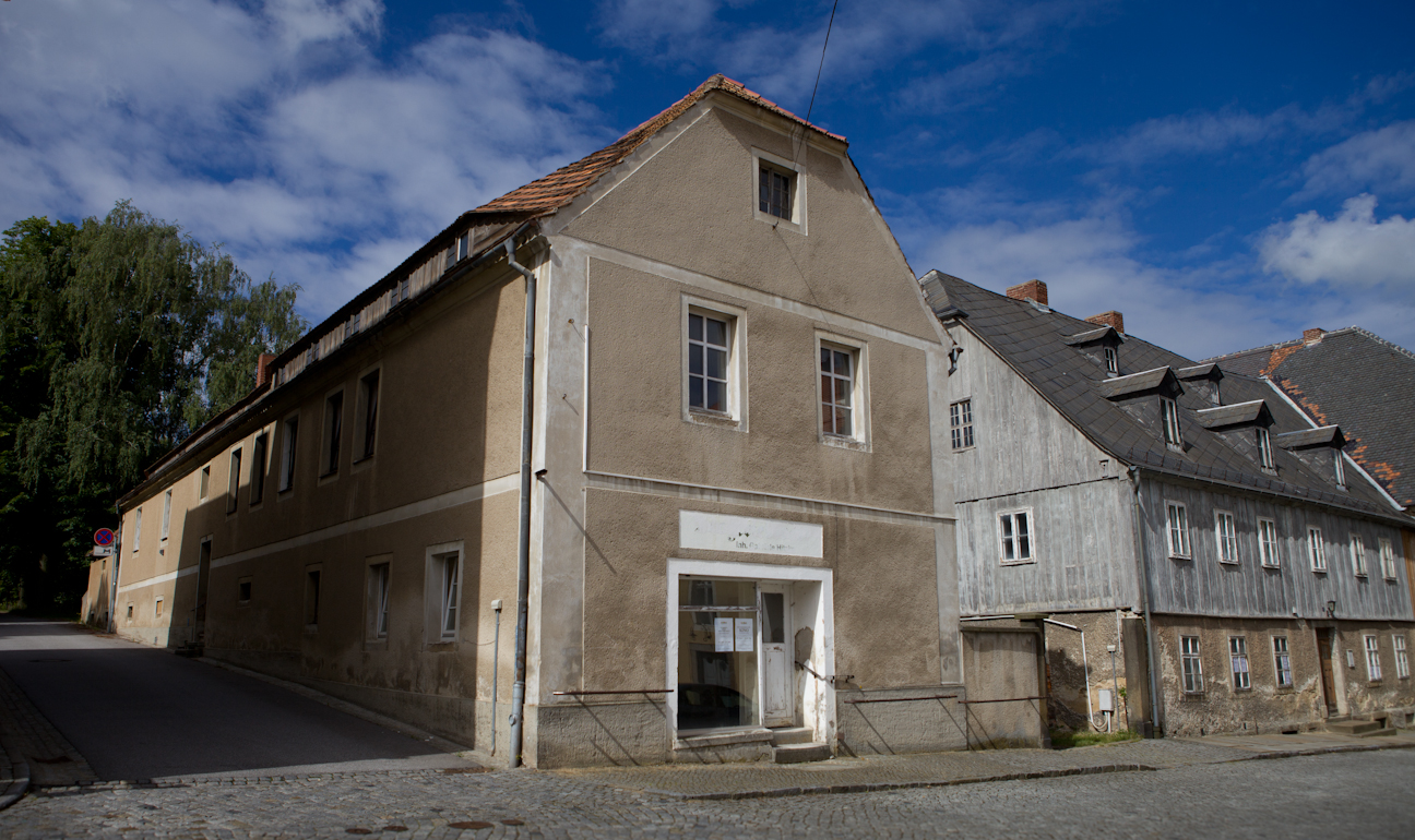 Apotheke Friedhofsweg 1 und Schwesternhaus Zinzendorfplatz 7, Kleinwelka